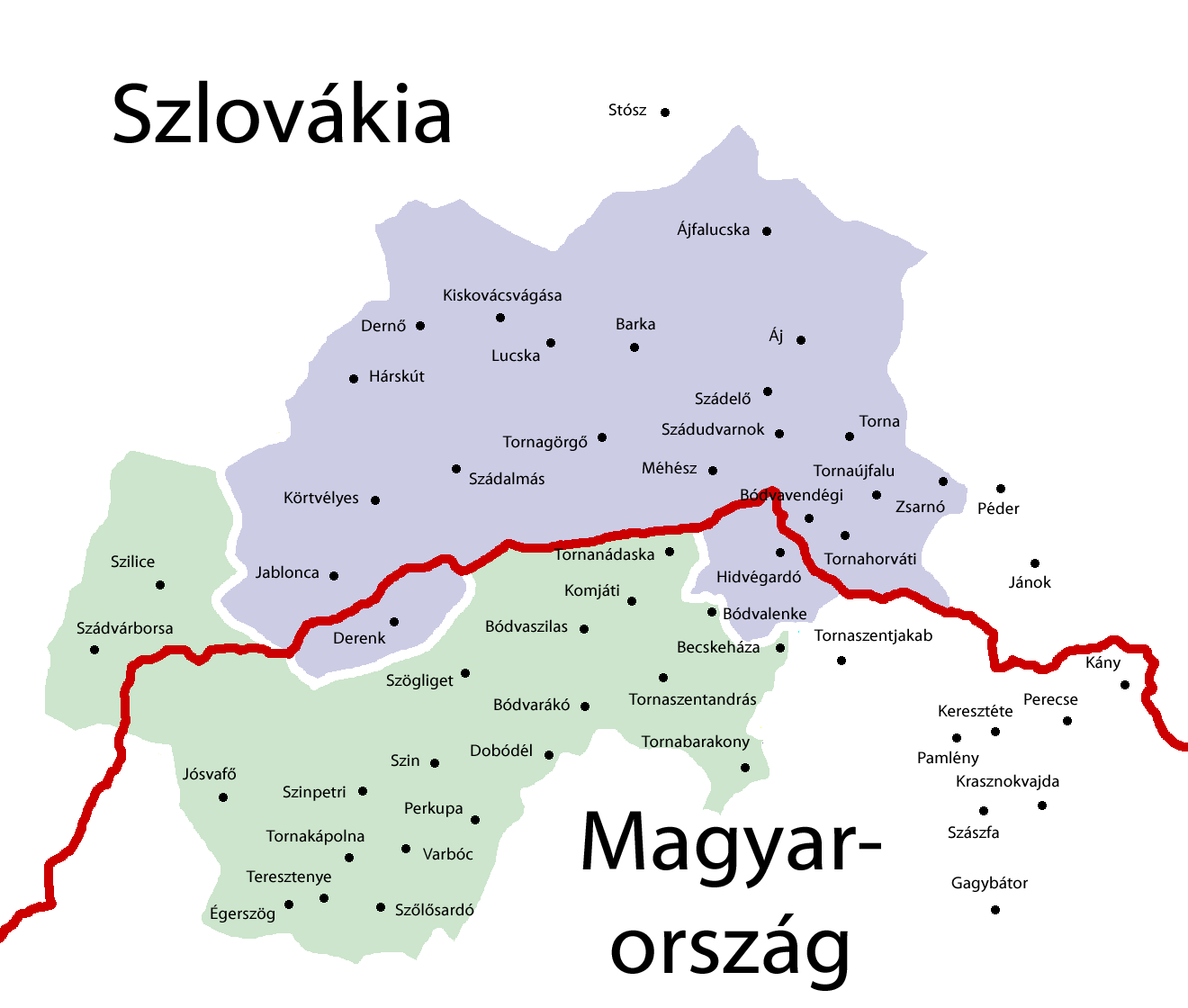 Az egykori Torna vármegye területe a mai országhatárokkal